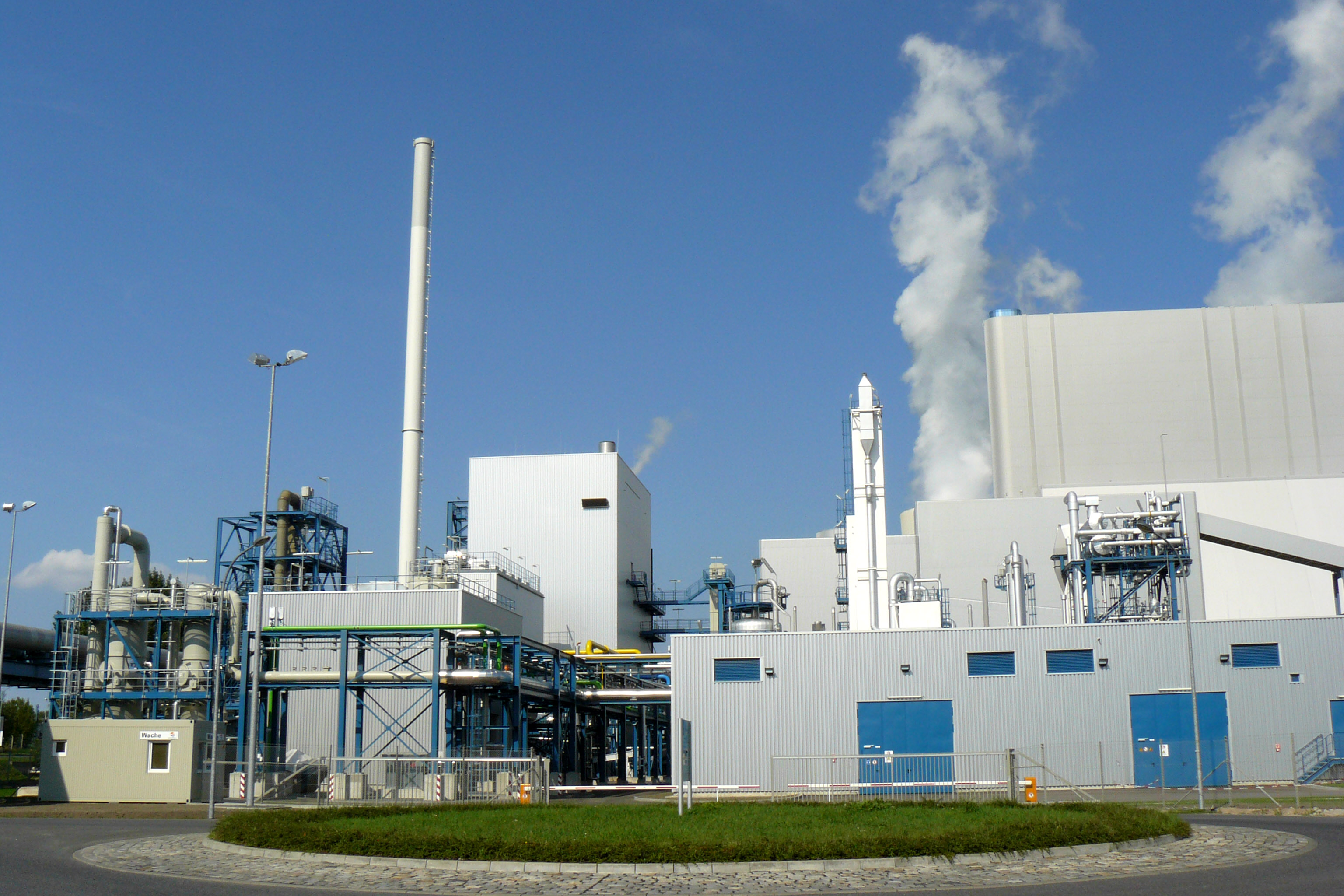 CO2-emissionsarmes Kraftwerk Schwarze Pumpe/ Spremberg/ Brandenburg/ Deutschland nach der offiziellen Inbetriebnahme.